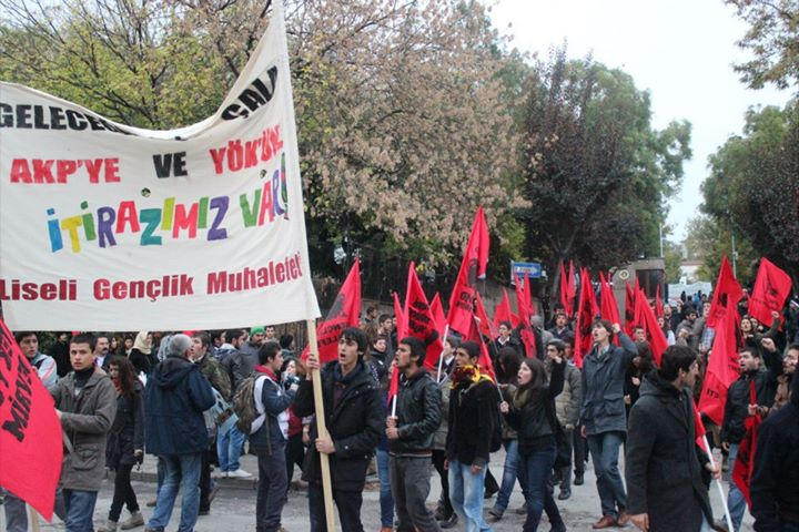 Liseli Devrimci Gençler bir eylem yürüyüşünde